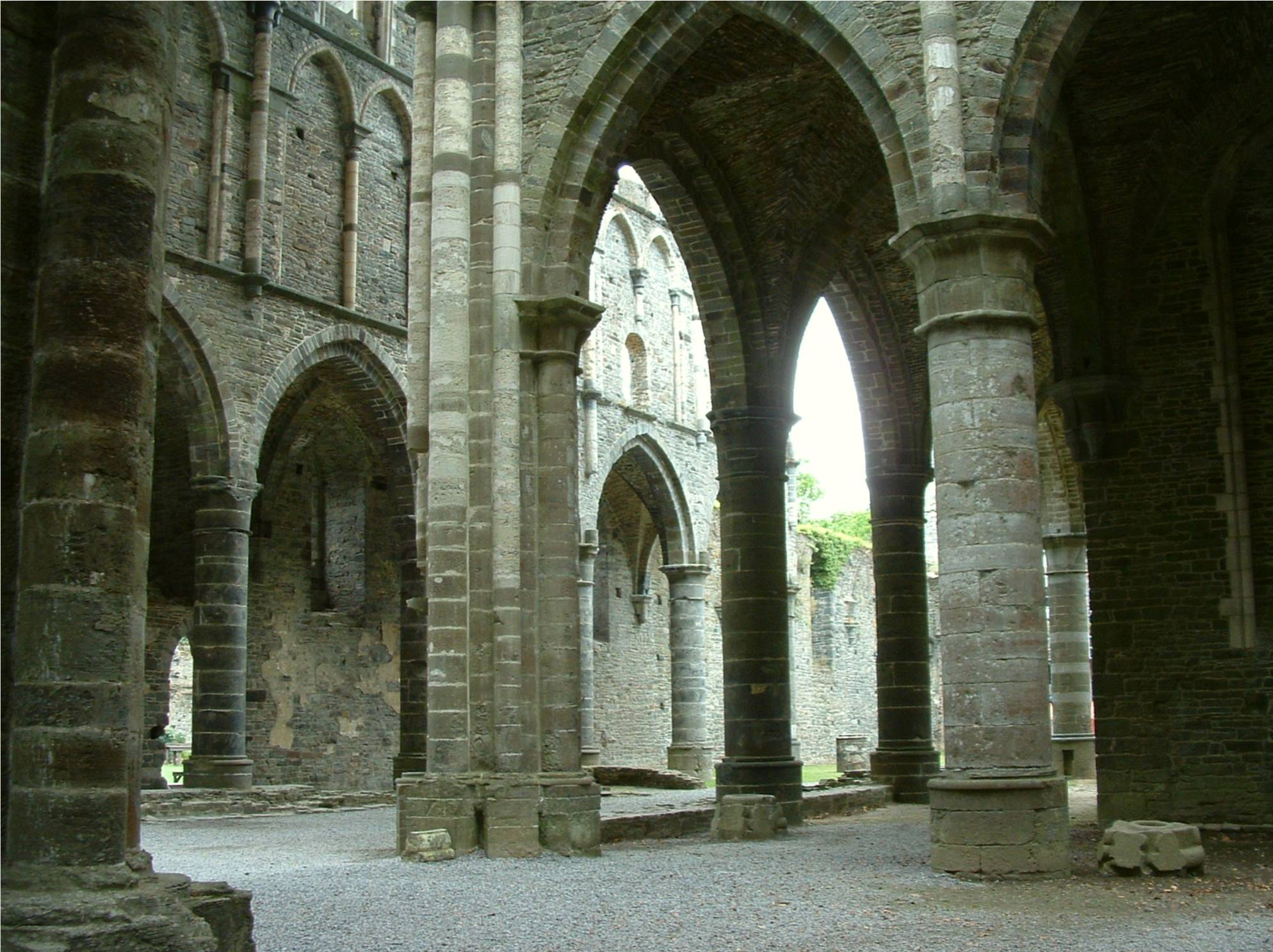 De abdijkerk van Villers (Foto: G. Debognies).